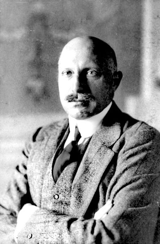 Freiherr von Jenisch, Deutscher Botschafter in Rom 1653-13